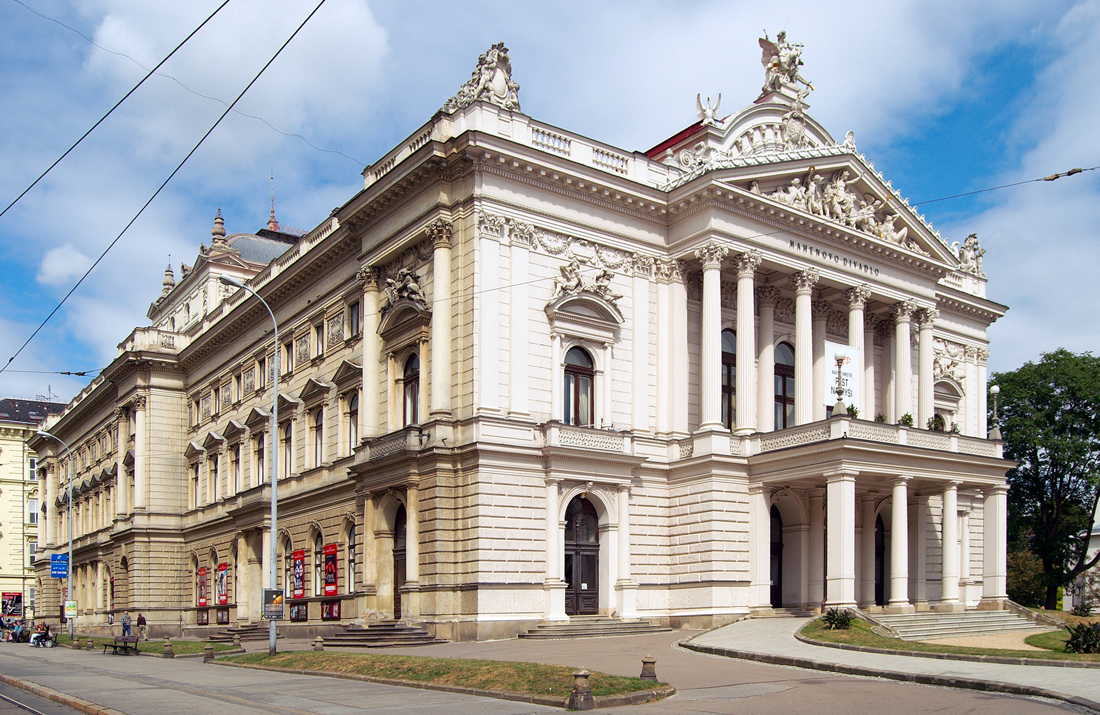 Město Brno - Mahenovo divadlo